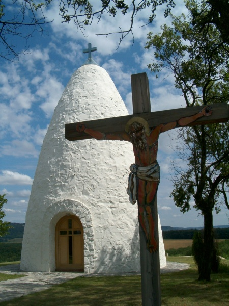 Sénye kápolnája